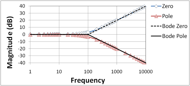 Bode low-pass magnitude plot